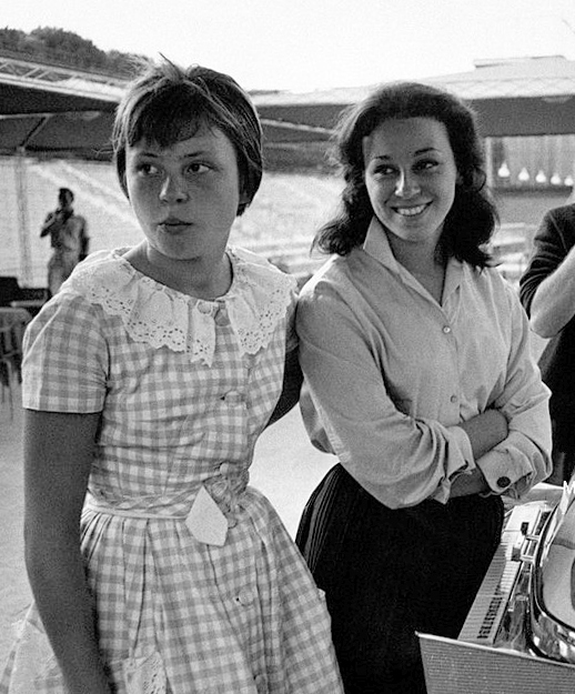 Daniela (left) and Anna Beneck